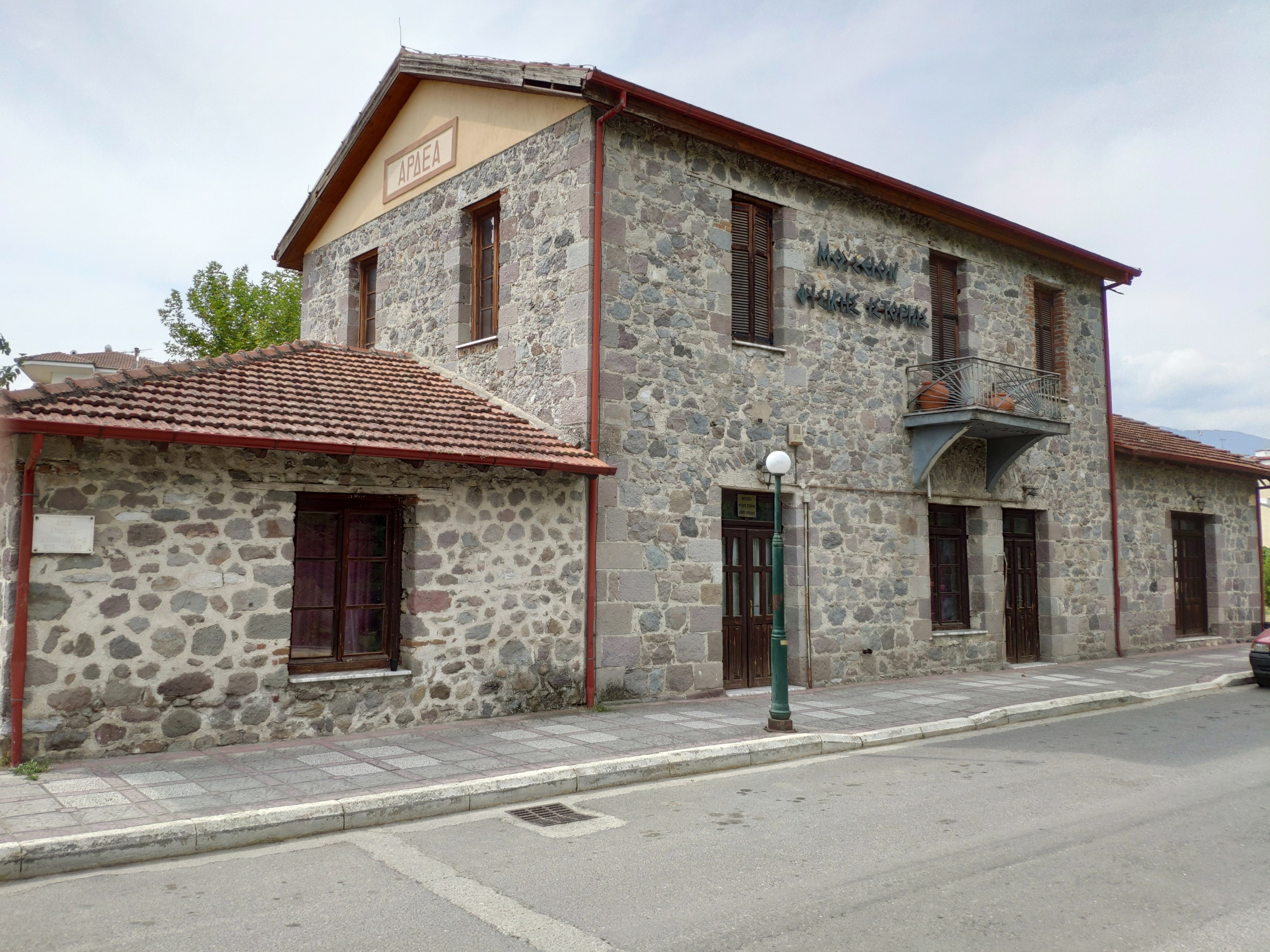 Παλιός σιδηροδρομικός σταθμός Αριδαίας. Σήμερα στεγάζει το Μουσείο Φυσικής Ιστορίας Δήμου Αριδαίας.«Παλιός σιδηροδρομικός σταθμός Αριδαίας»